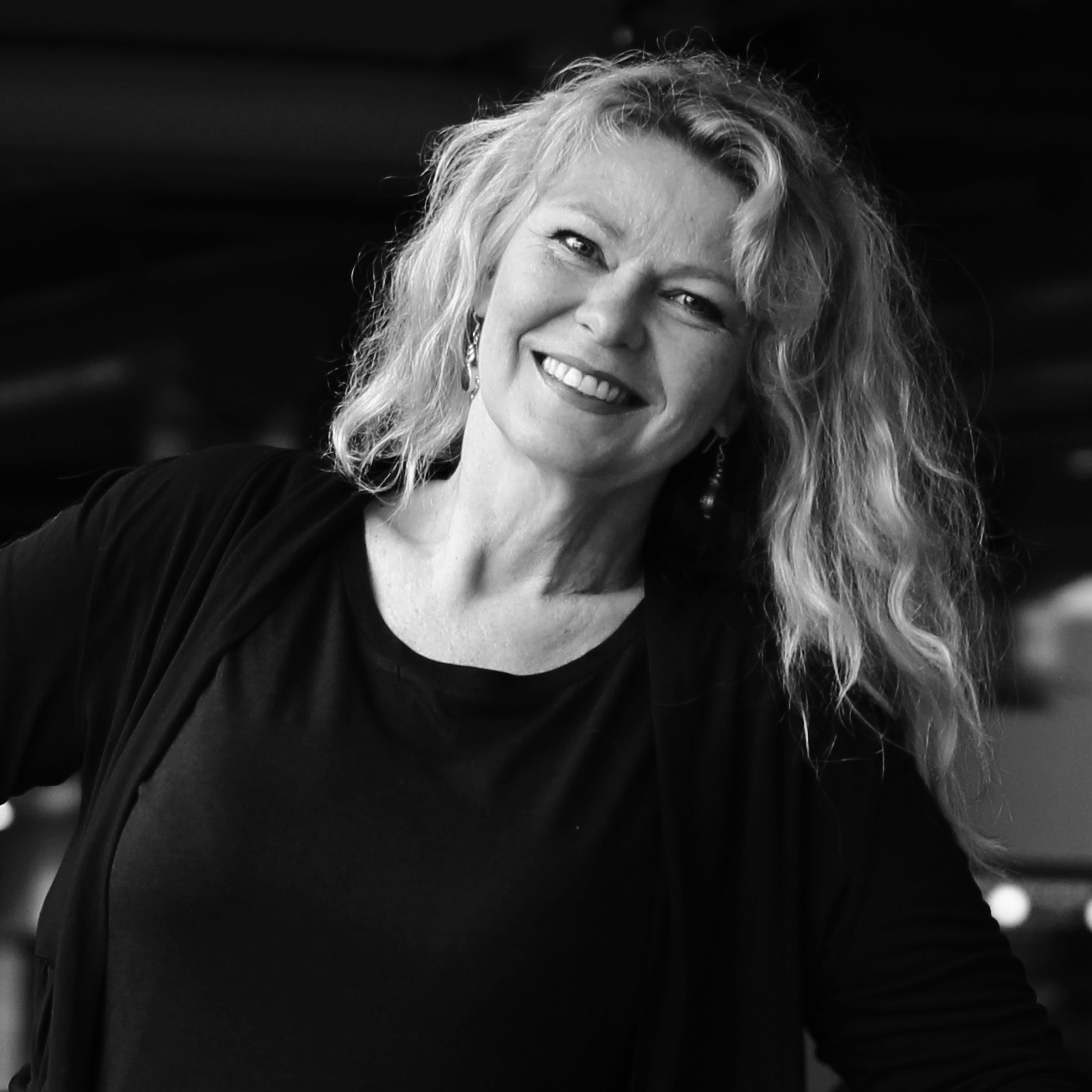 Skådespelerskan Ing-Marie Carlsson.